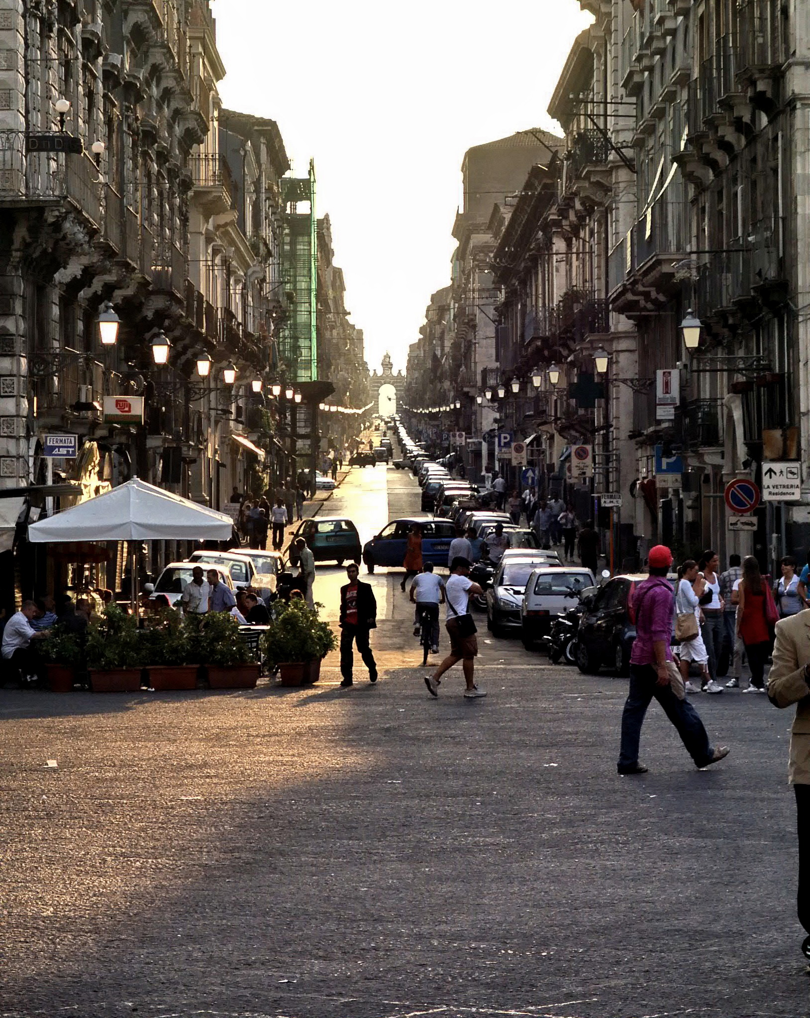 La Via Garibaldi (Catania) vista da piazza Duomo, con in fondo il Fortino.